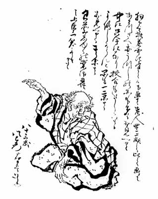 Hokusai self-portrait